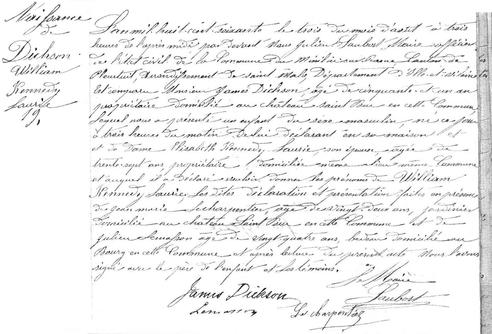 C'est l'extrait d'acte de naissance d'un des inventeurs du cinéma, le premier réalisateur de cinéma, et le premier acteur dans un film : William Kennedy Laurie Dickson, franco-britannique, collaborateur de Thomas Edison. Concepteur du Kinétographe et du Kinétocope avec Edison